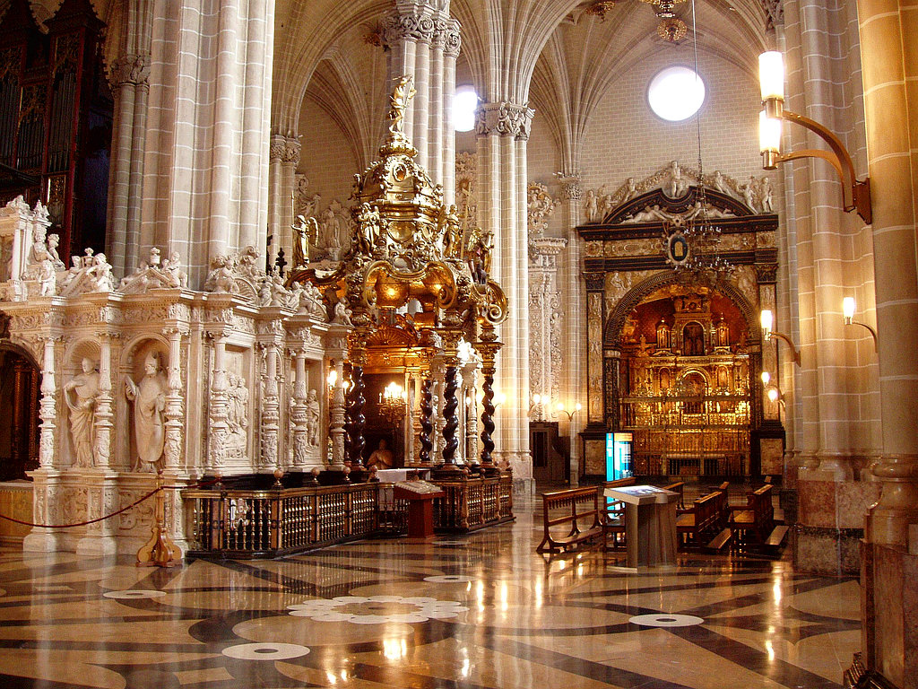 Interior de la Catedral de La Seo (Zaragoza, Spain). A la izquierda trascoro y Capilla y templete del Santo Cristo. A la derecha, capilla lateral de Gabriel Zaporta.